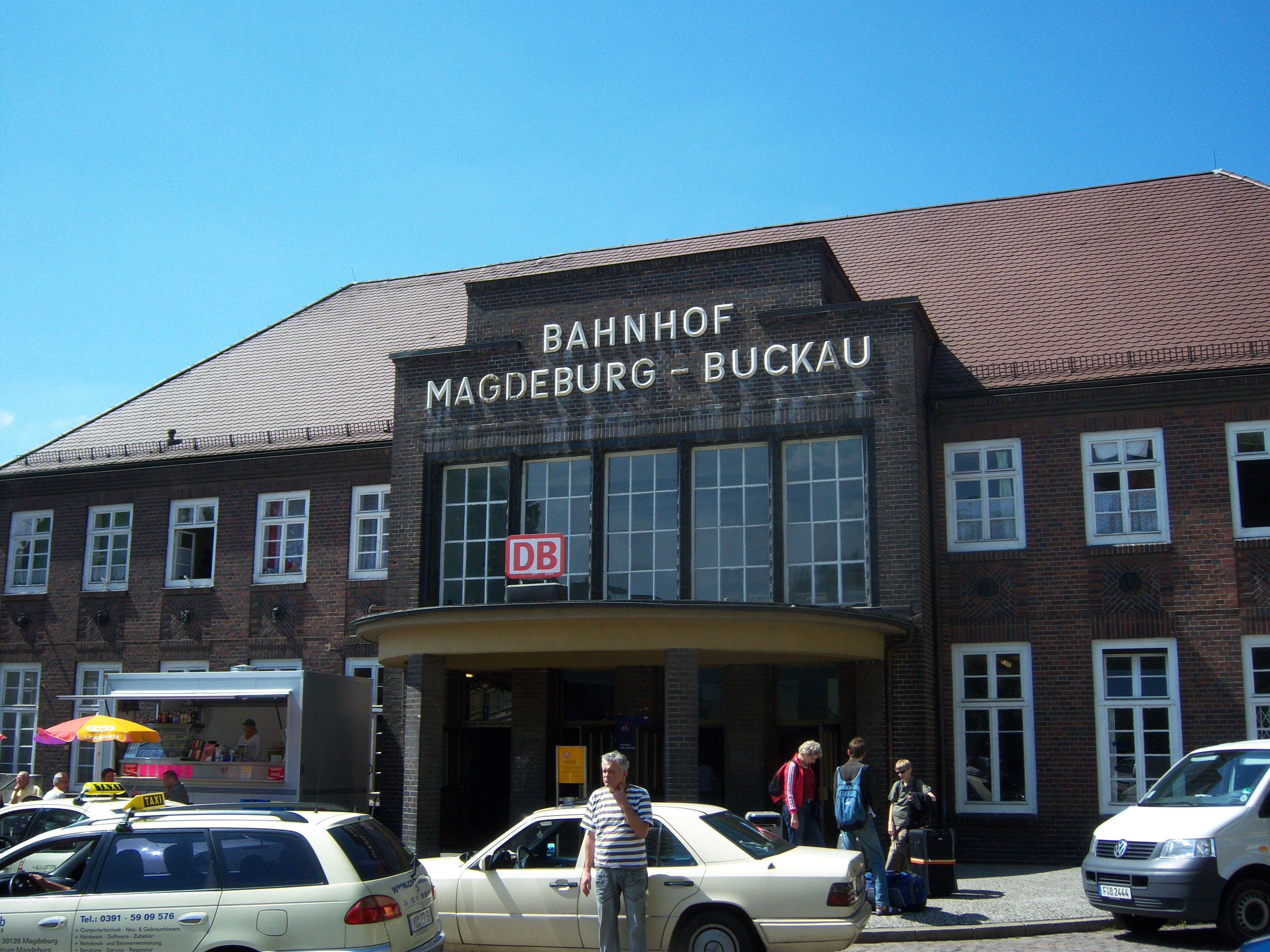 Bild des Bahnhofs Buckau in Magdeburg